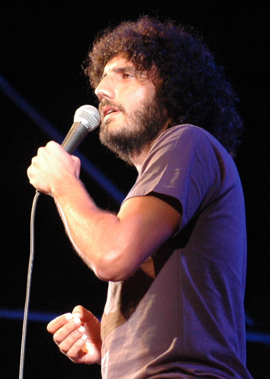 Andrea Rivera